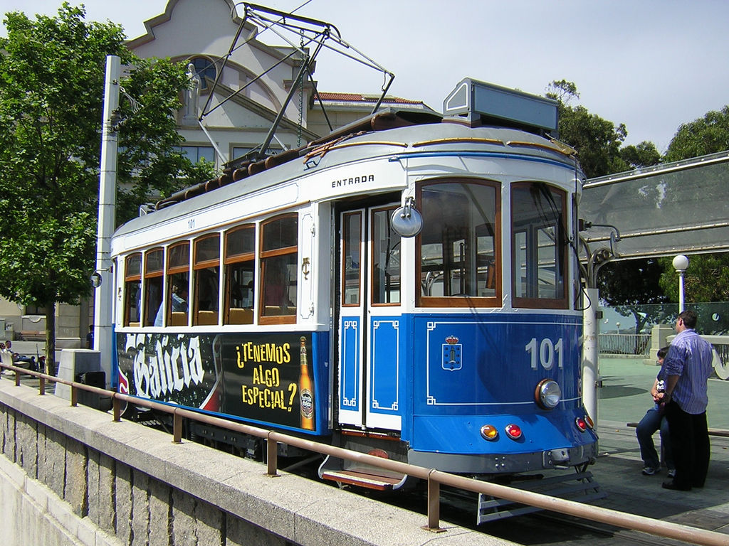 Tranvía, A Coruña, Galiza'Tranvía coruñés'